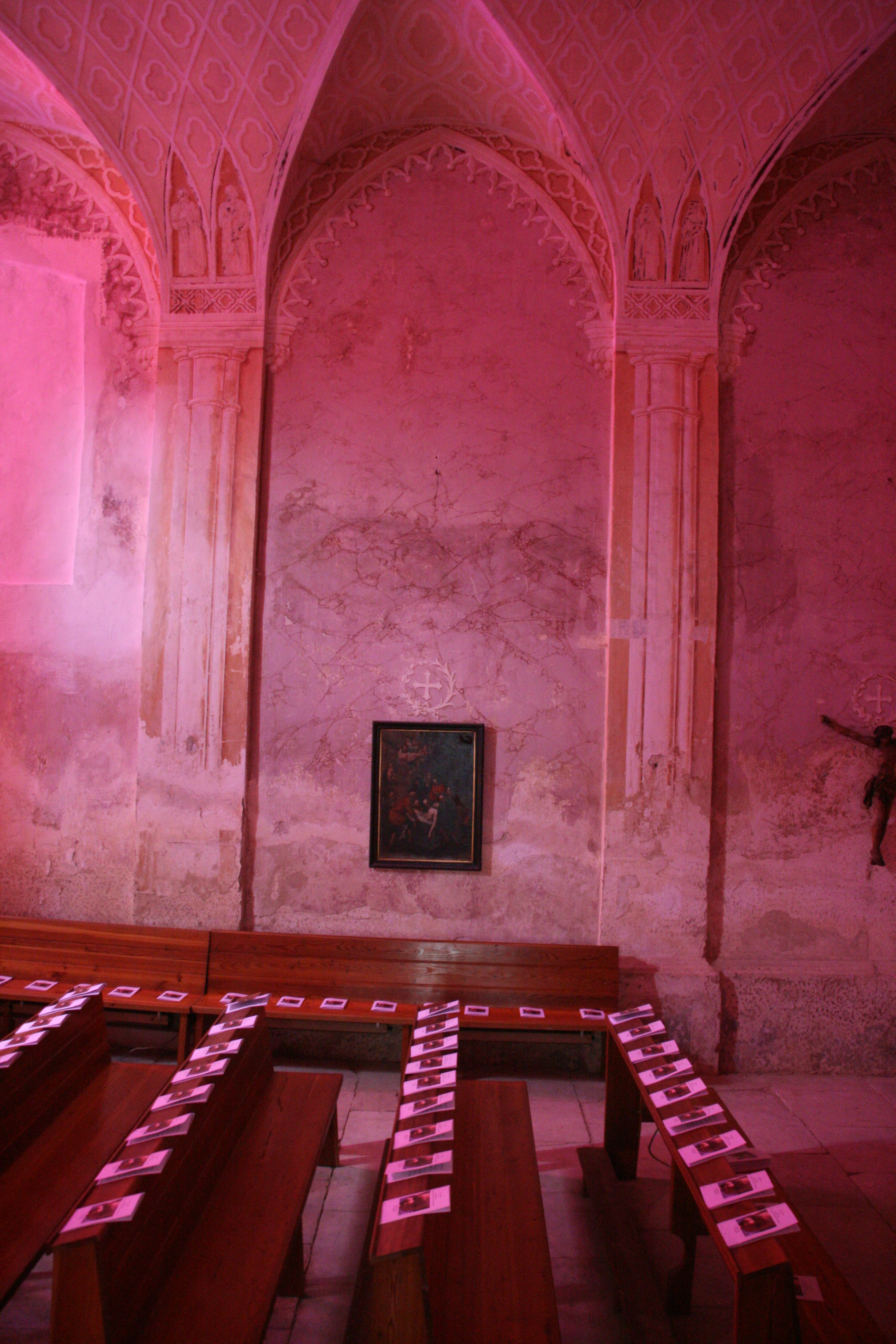 Die Schlosskapelle